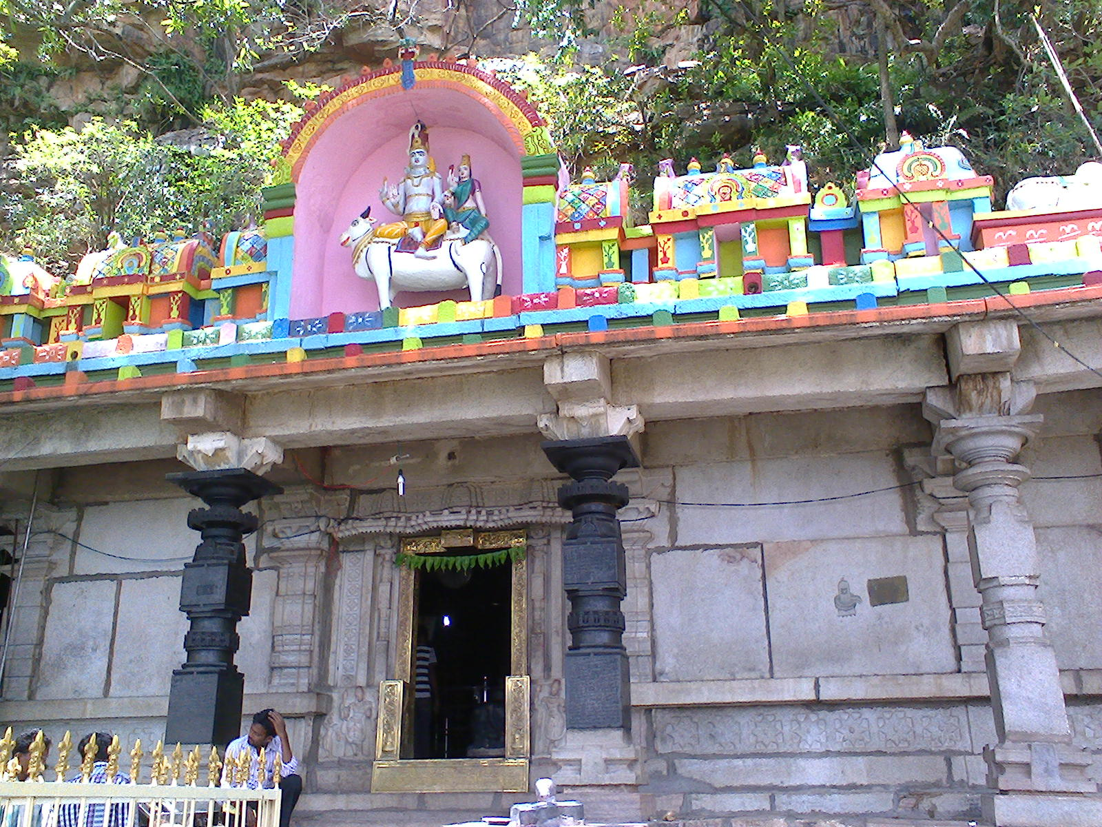 ఉమామహేశ్వరాలయం